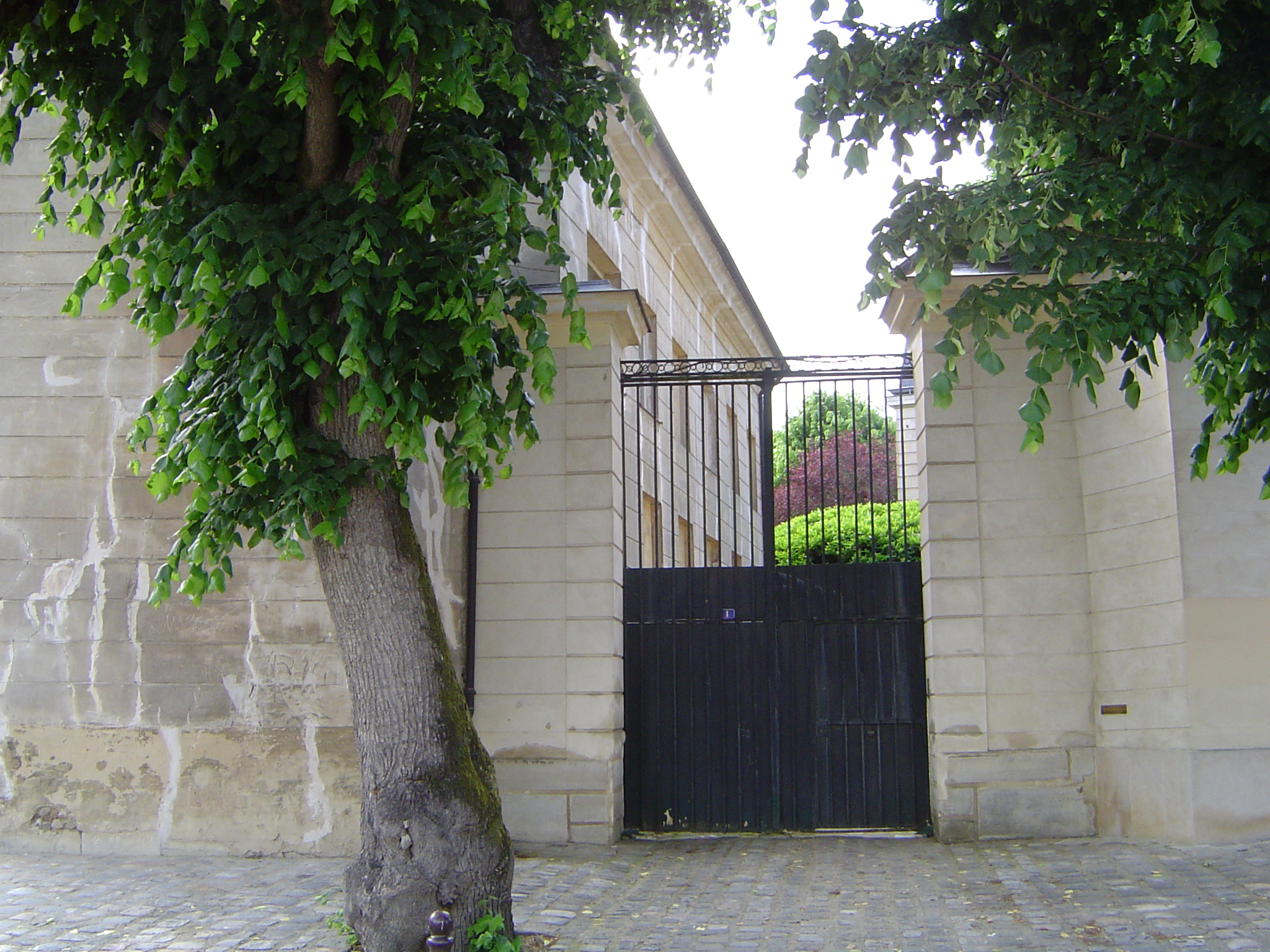 Ancienne propriété de l'acteur François Molé, 1 rue des Sources, Antony.